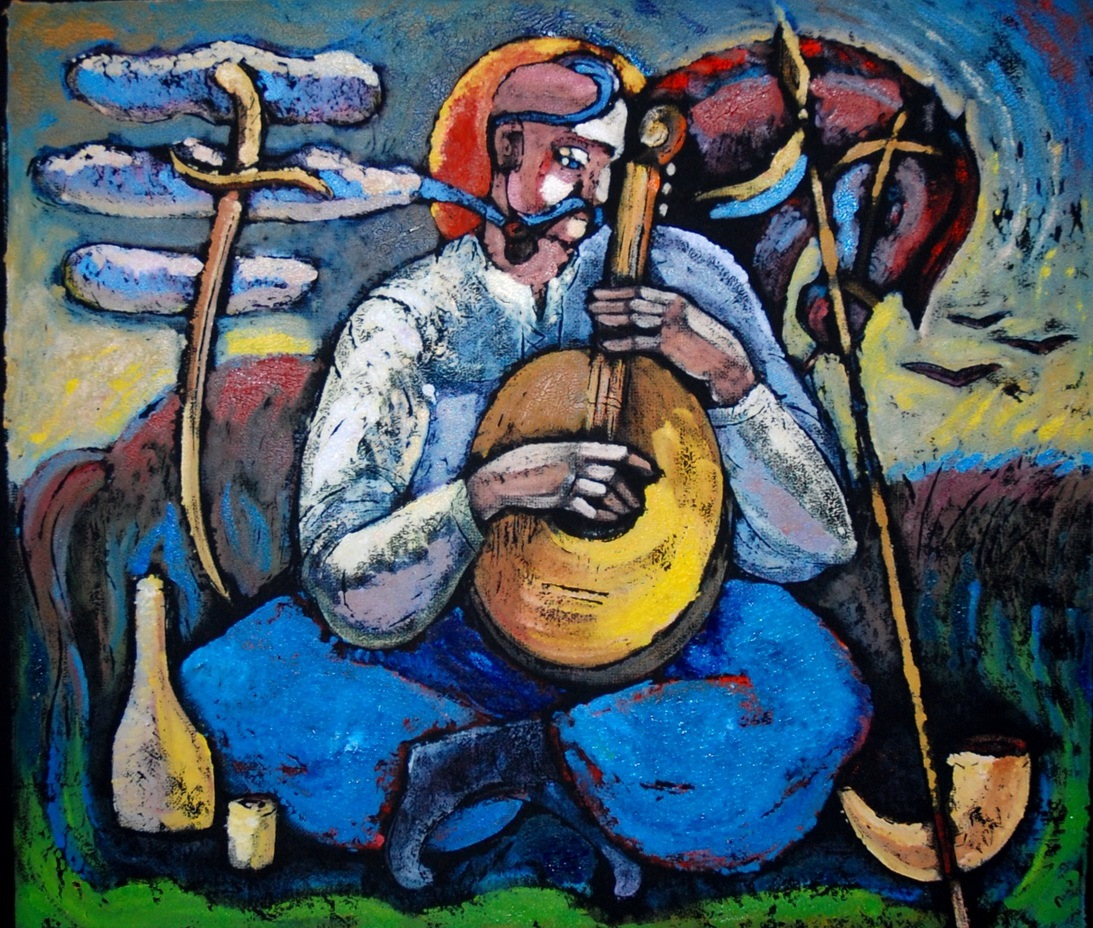 фото картини Віктора Цапка "Козак-бандурист", 2013 р.